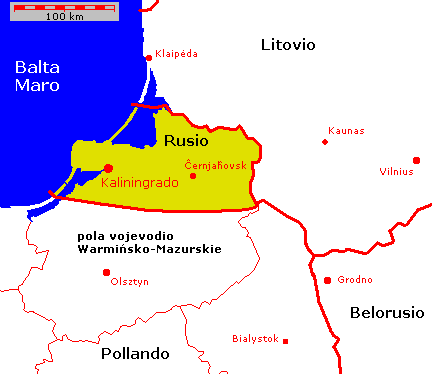 Distrikto de Kaliningrad/Kenigsbergo